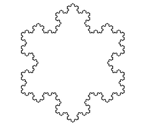 von Kochs snöflinga, en fraktal skapad av den svenske matematikern Helge von Koch år 1904. Andra bilder i samma serie: Linjära fraktaler: Sierpinskitriangel Lévys C-kurva Harter-Heighways drakkurva Koch curve Kategori:Bilder av fraktaler